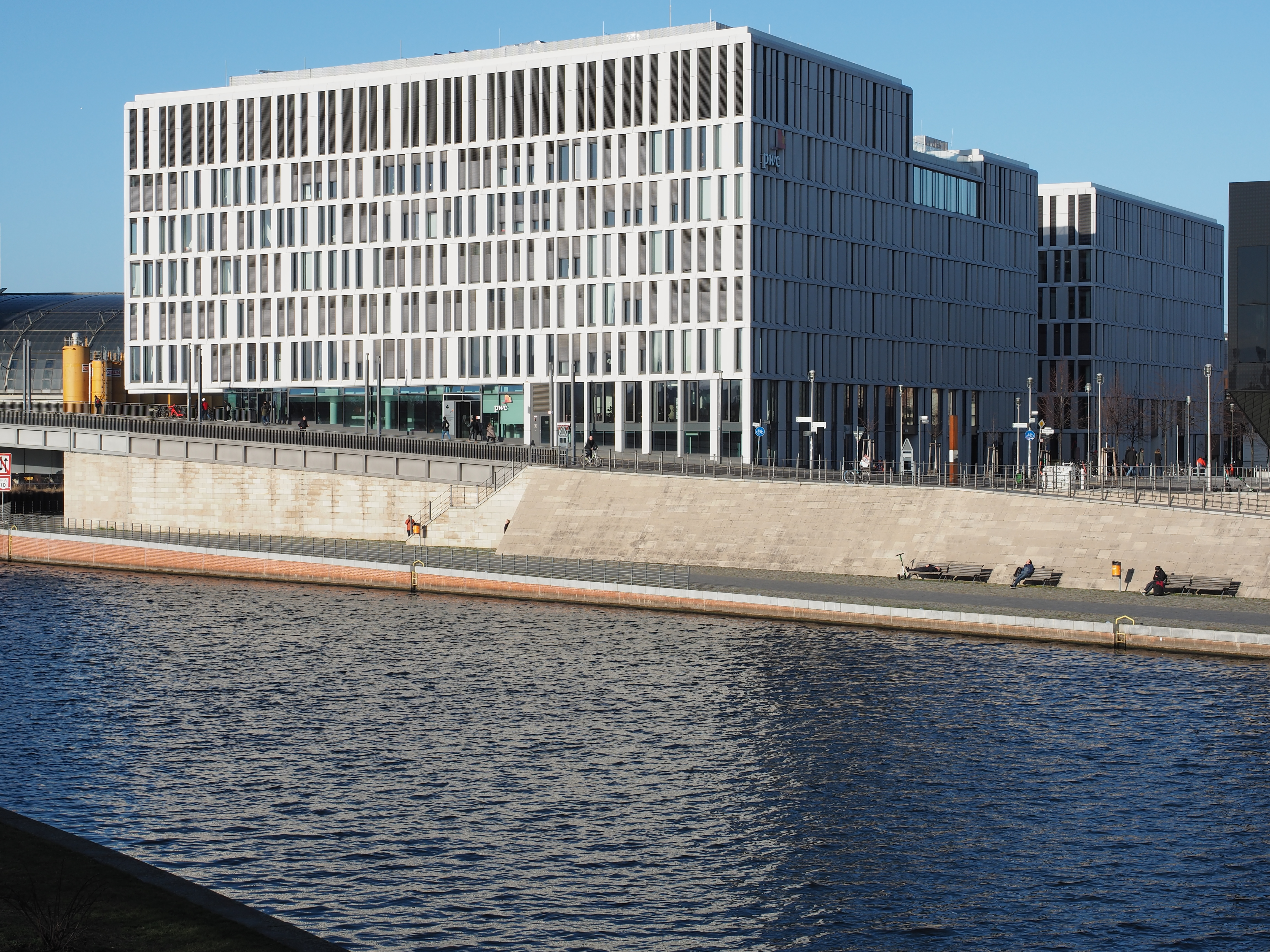 Humboldthafen Eins (Berlin)